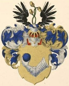 Pohlmanni suguvõsa aadlivapp